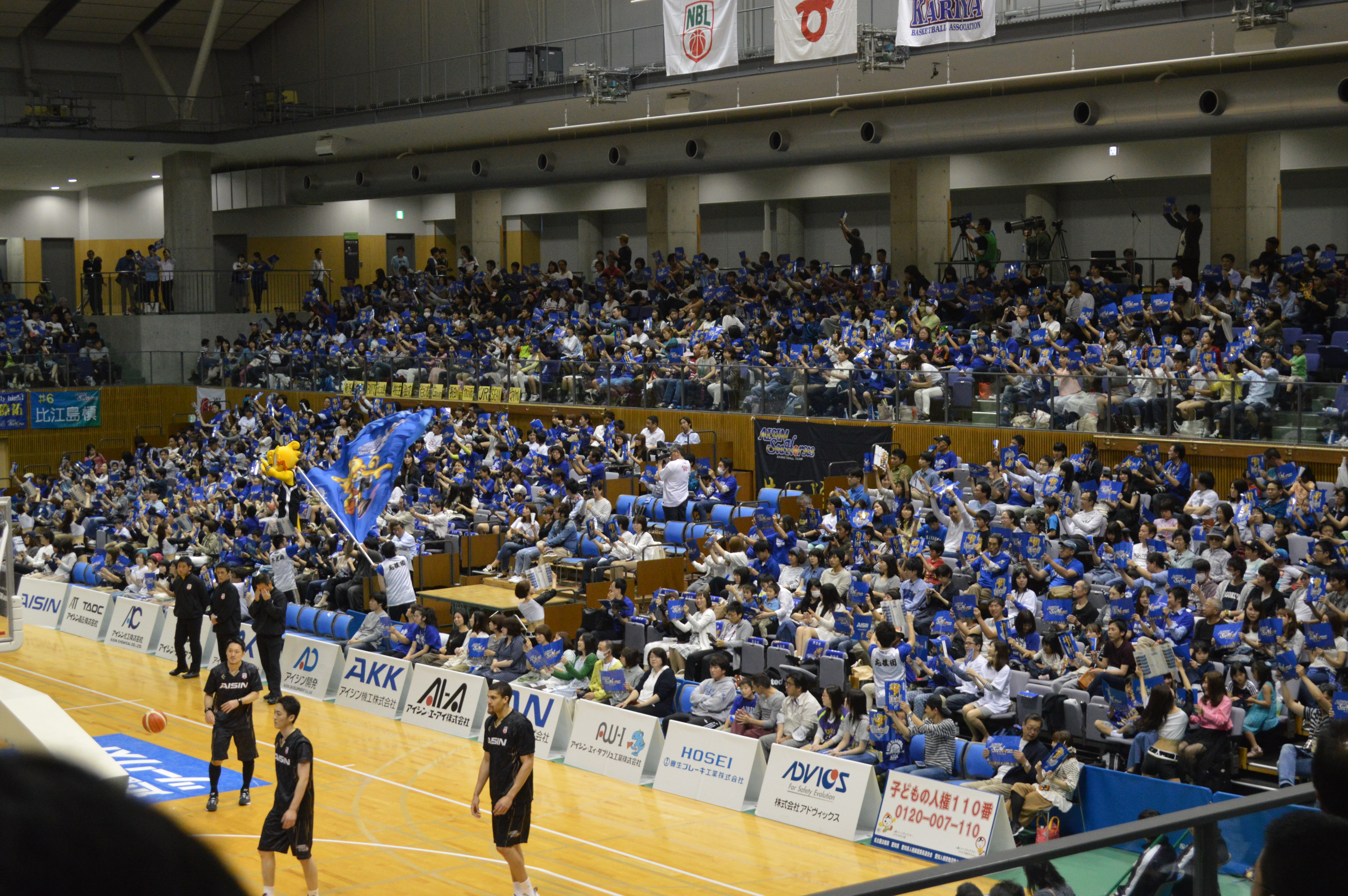 2015-16 NBL アイシンシーホース三河vsレバンガ北海道 ウィングアリーナ刈谷